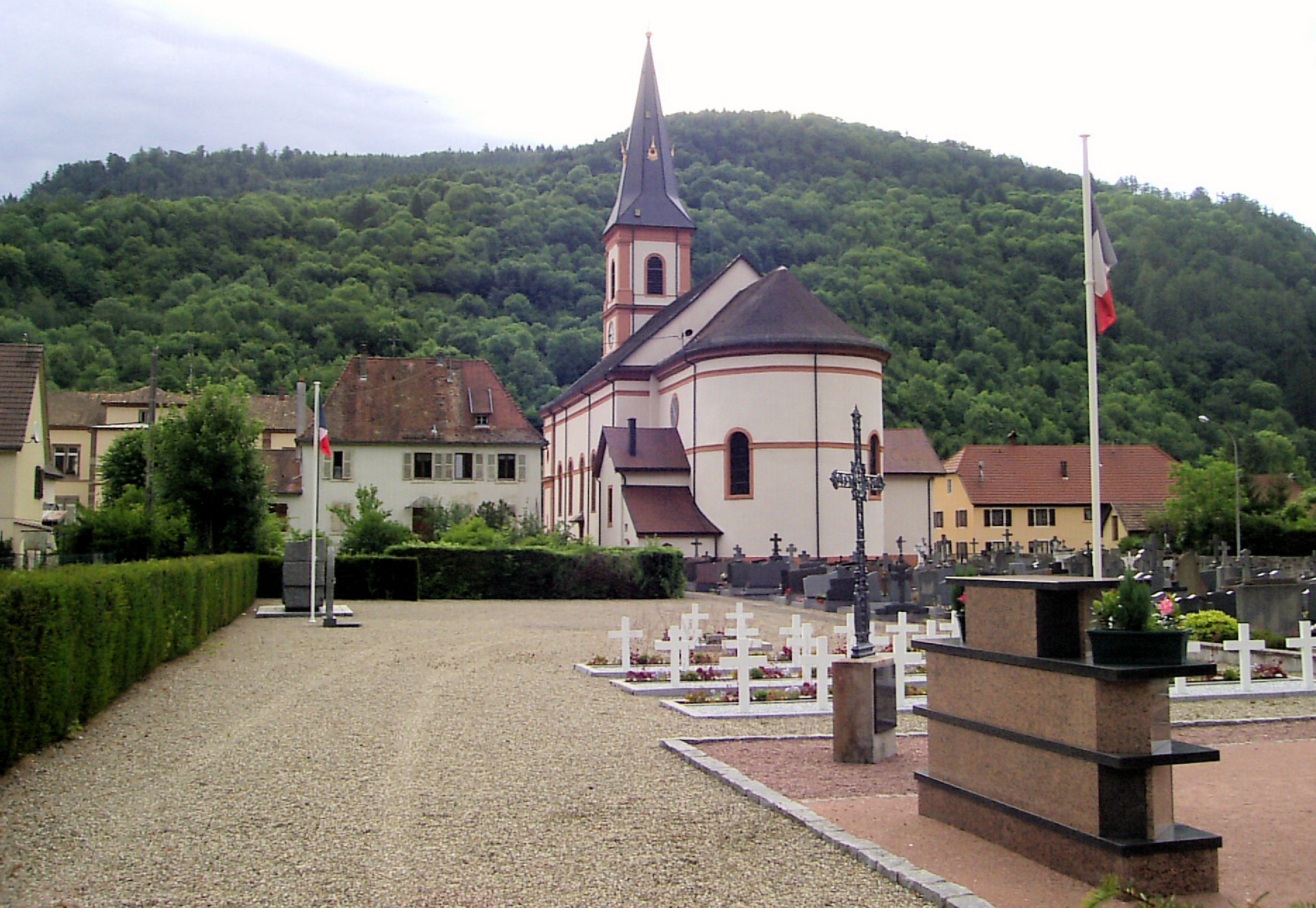 L'église Saint-Wendelin à Kruth